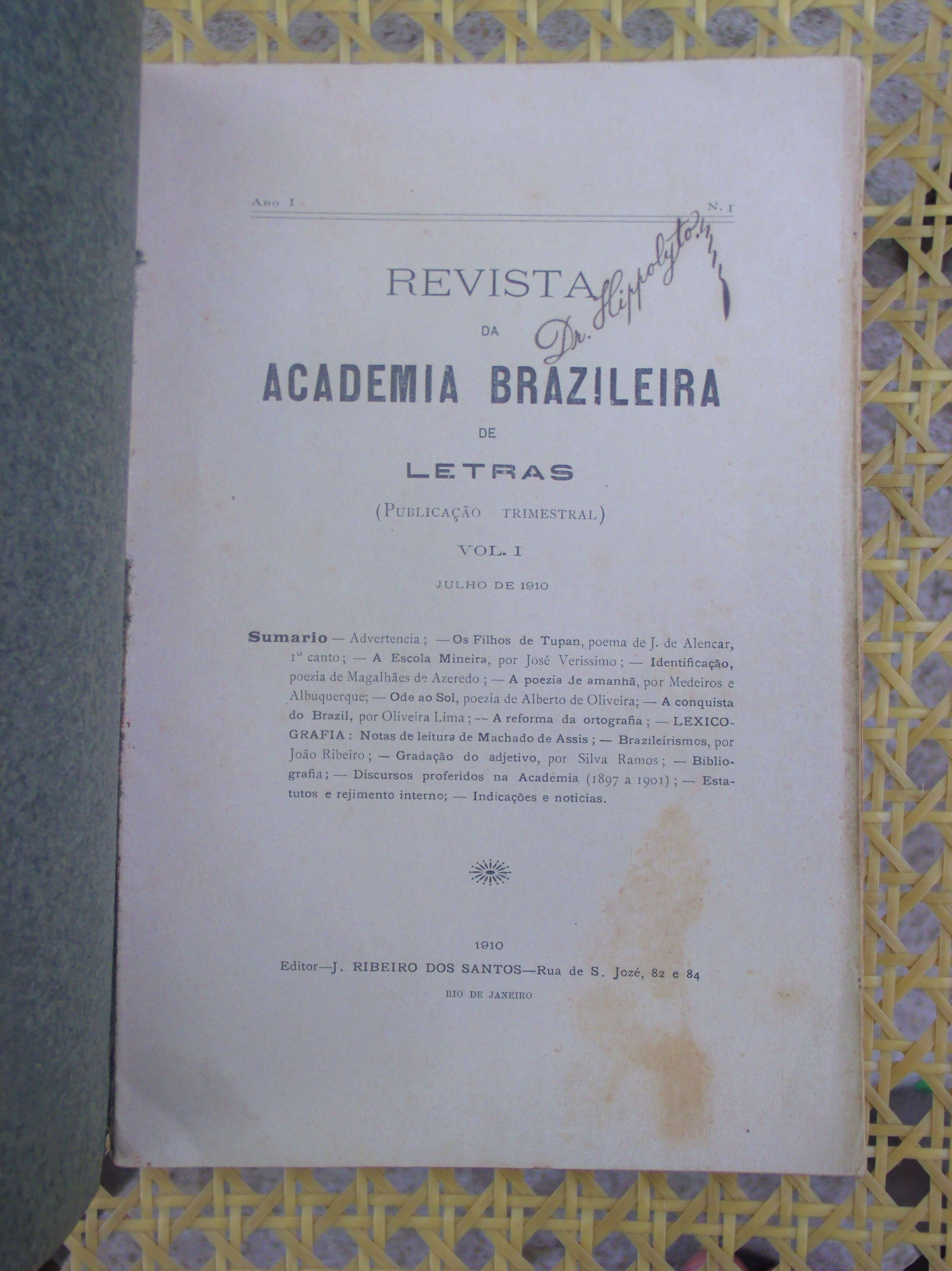 Folha de rosto da edição numero 1 da Revista da Academia Brasileira de Letras.